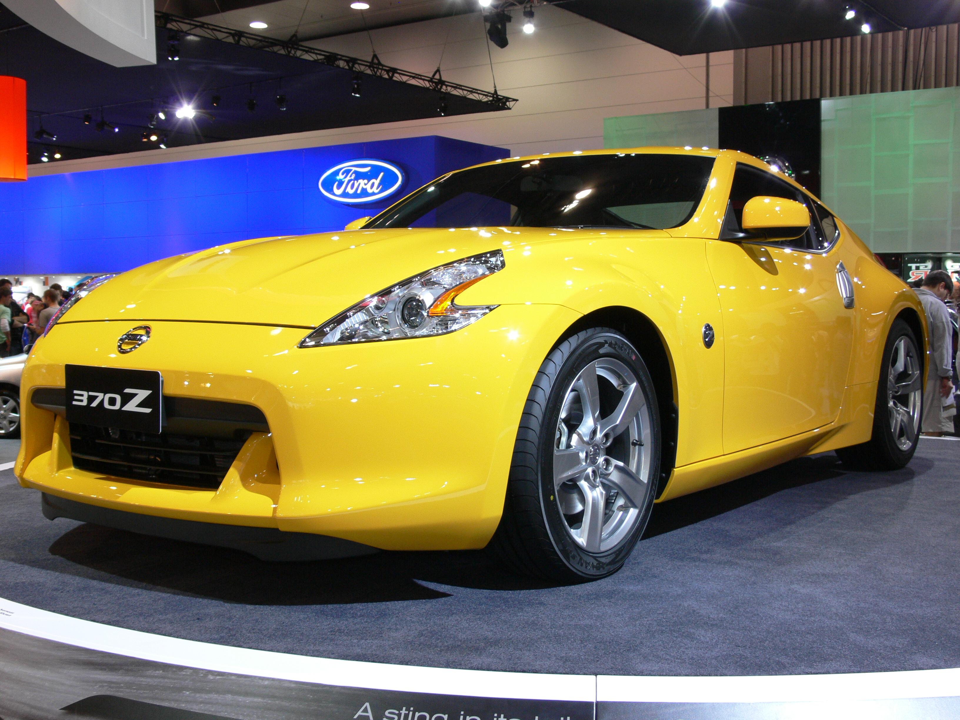 Nissan 370Z au Salon de Melbourne